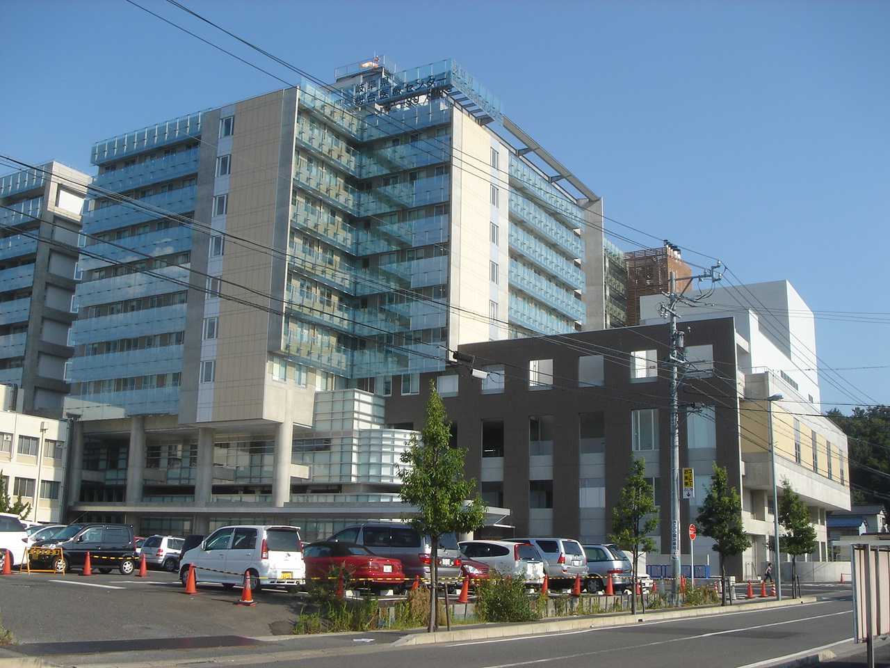 Gifu Prefectural General Medical Center(岐阜県総合医療センター),Gifu,Gifu,Japan(岐阜県岐阜市)で撮影。